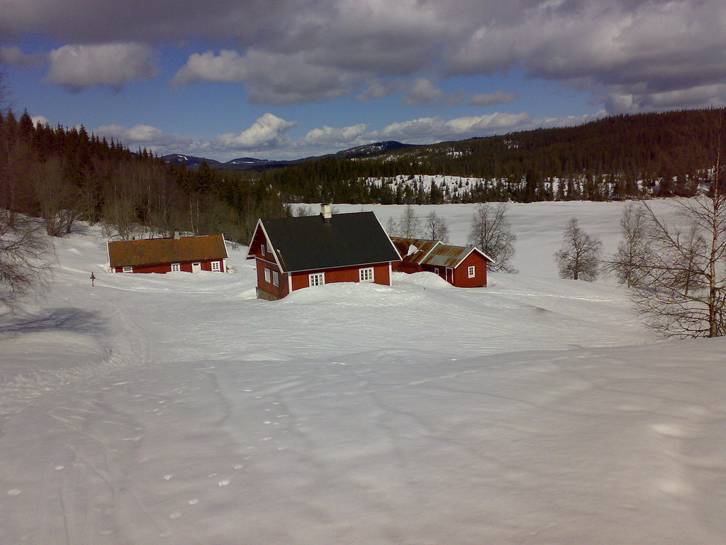 Finnstad gård i Nordmarka.